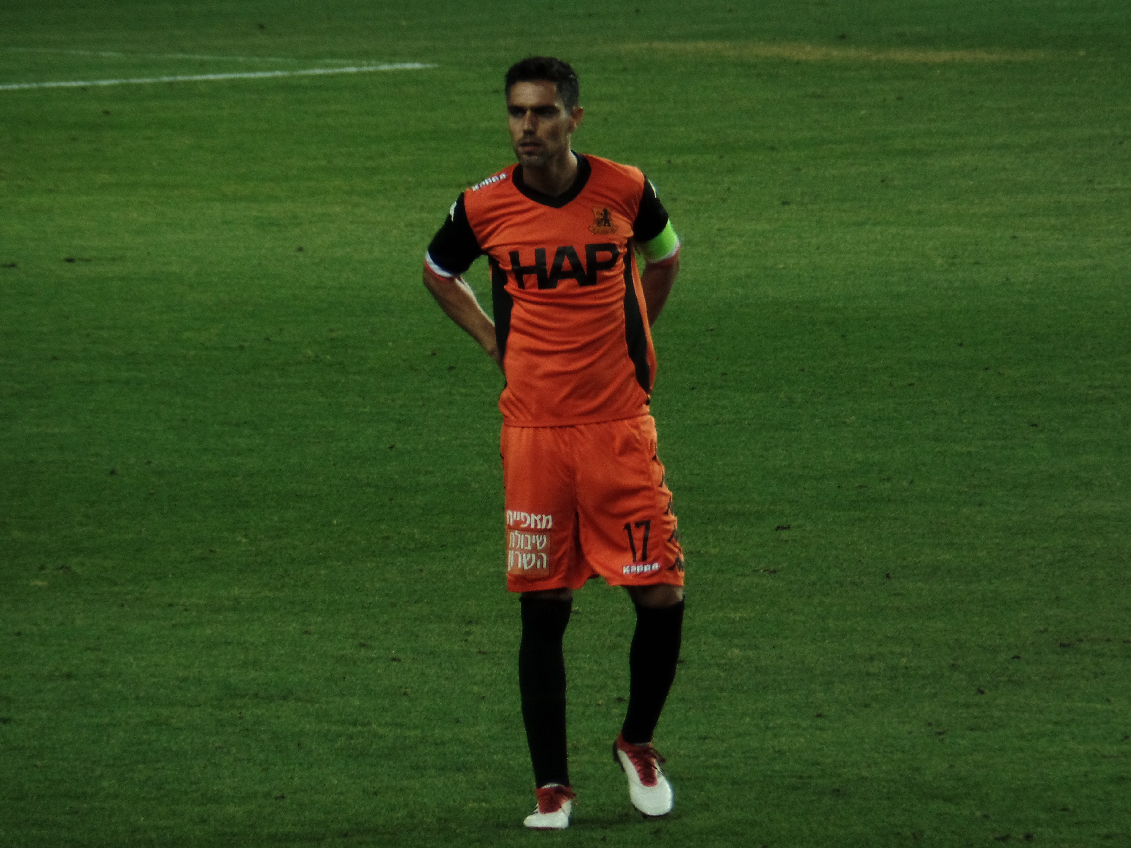 איציק עזוז, במדי בני יהודה ת"א, 2018